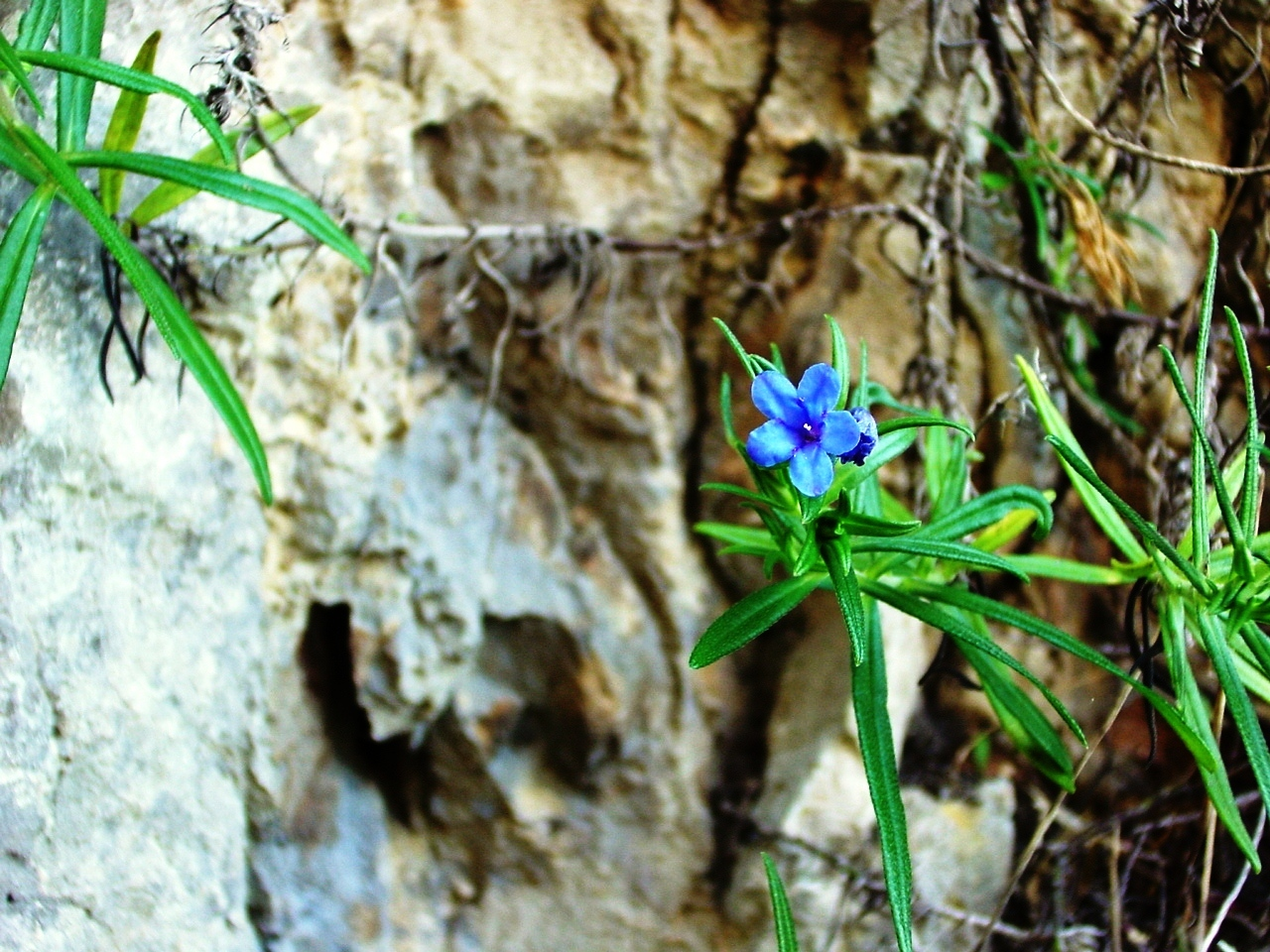 Specie:Lithodora rosmarinifolia Riserva naturale Monte Pellegrino